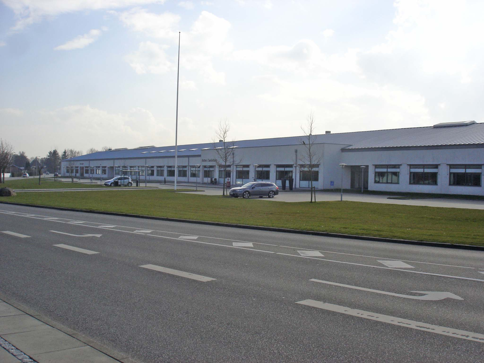 Retten i Sønderborg og Vestre Landsrets bitingsted i bydelen Sundsmark